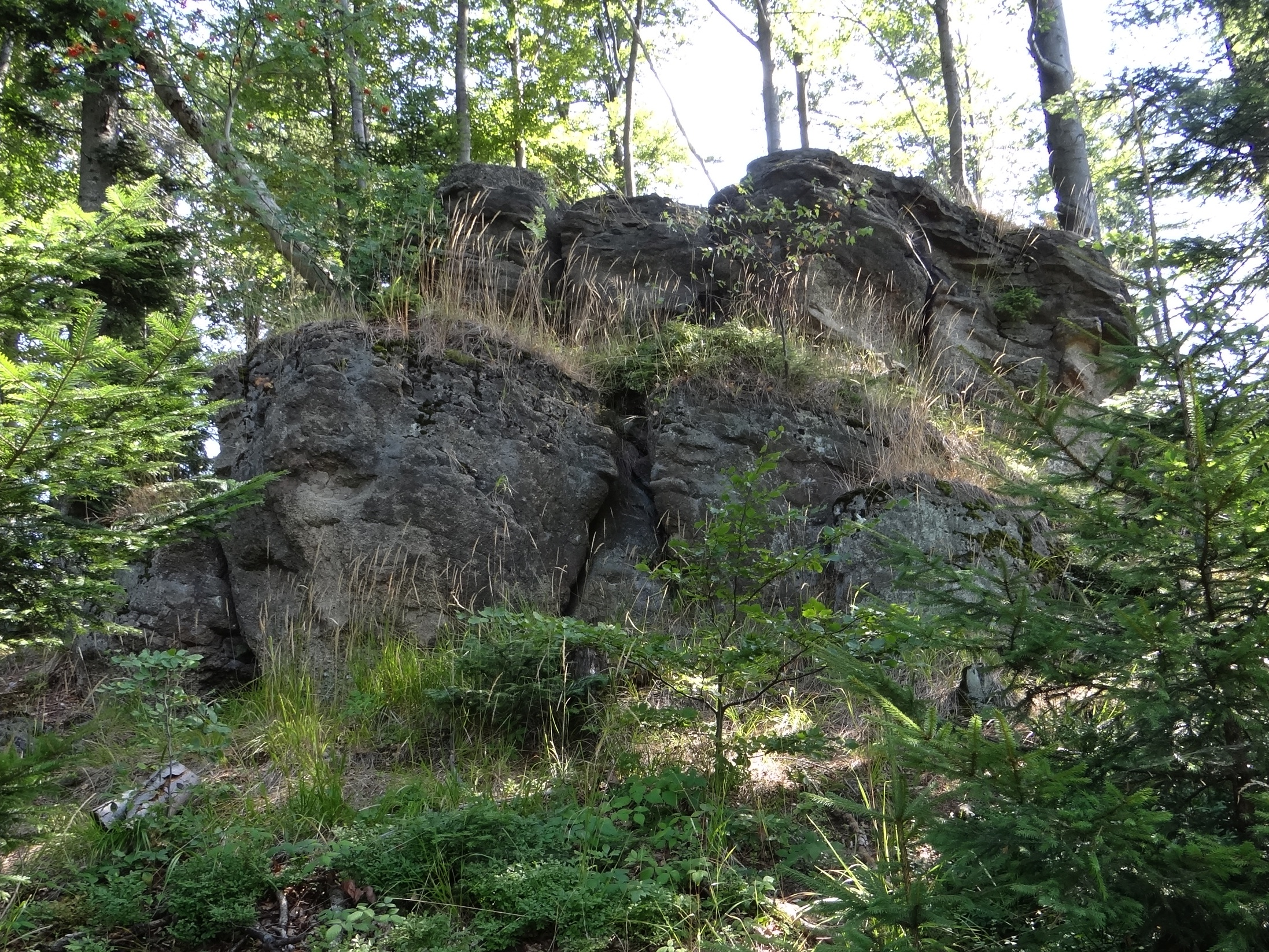 Skałki na Łamanej Skale